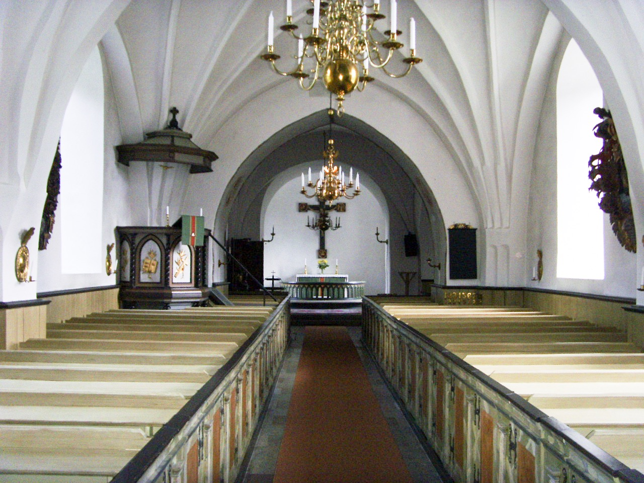 Interiör mot altaret.